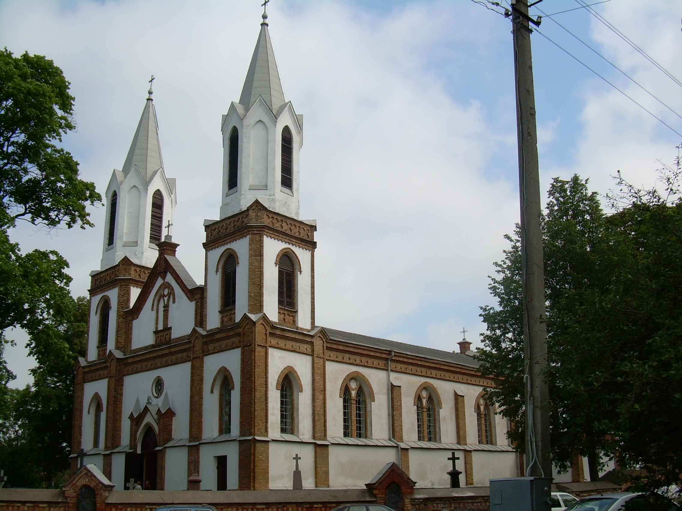 Grinkiškio Švč. Mergelės Marijos Apsilankymo bažnyčia